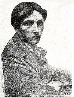 Autoretrat en carbó sobre paper de Fidel Aguilar Marcó (1894-1917).